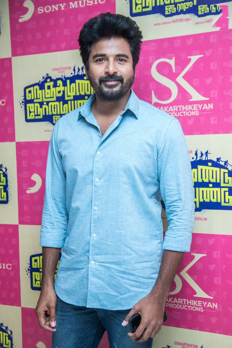 Sivakarthikeyan at the ‘Nenjamundu Nermaiyundu Odu Raja’ Audio Launch